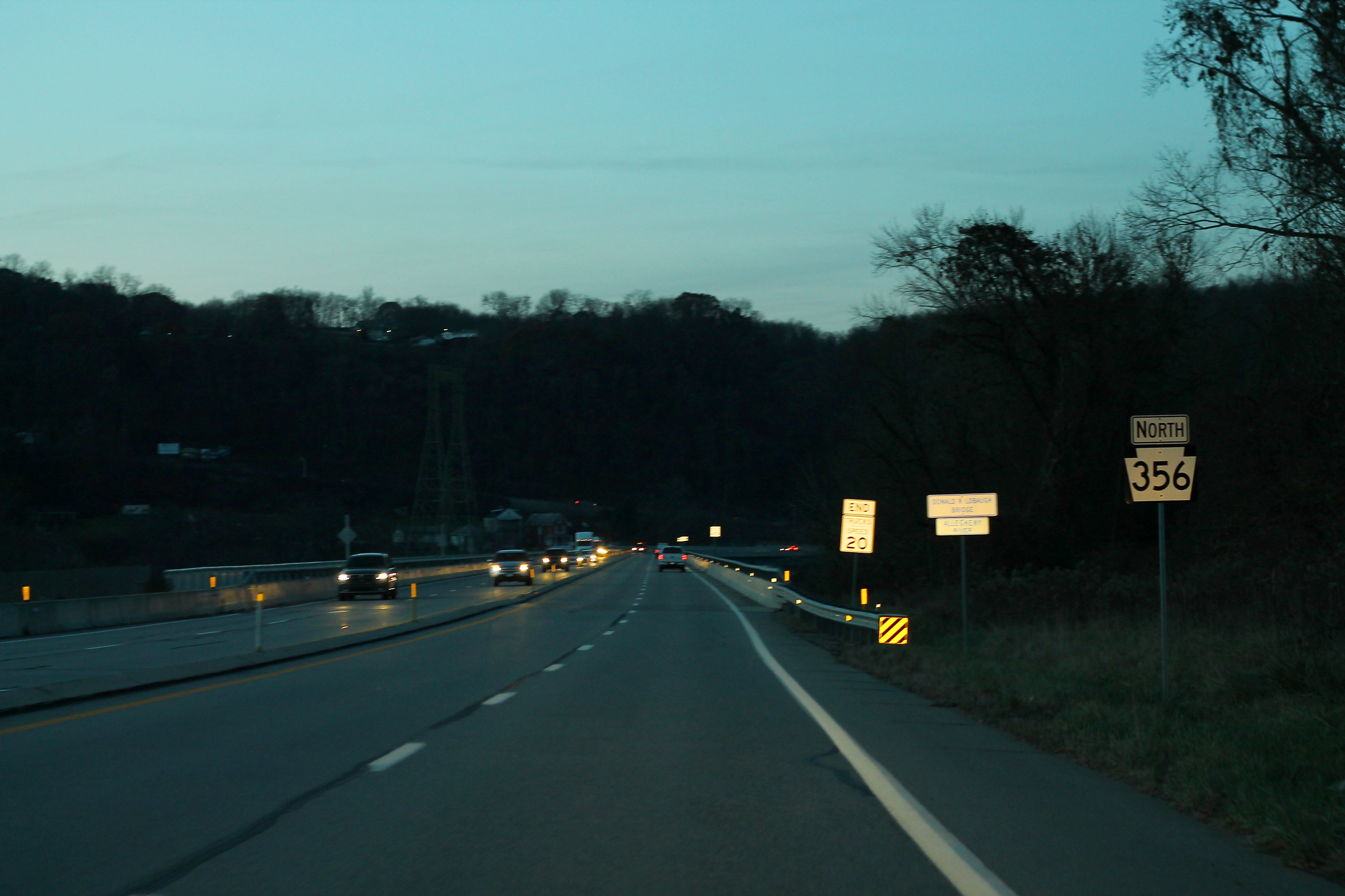 PA356nRoadSign